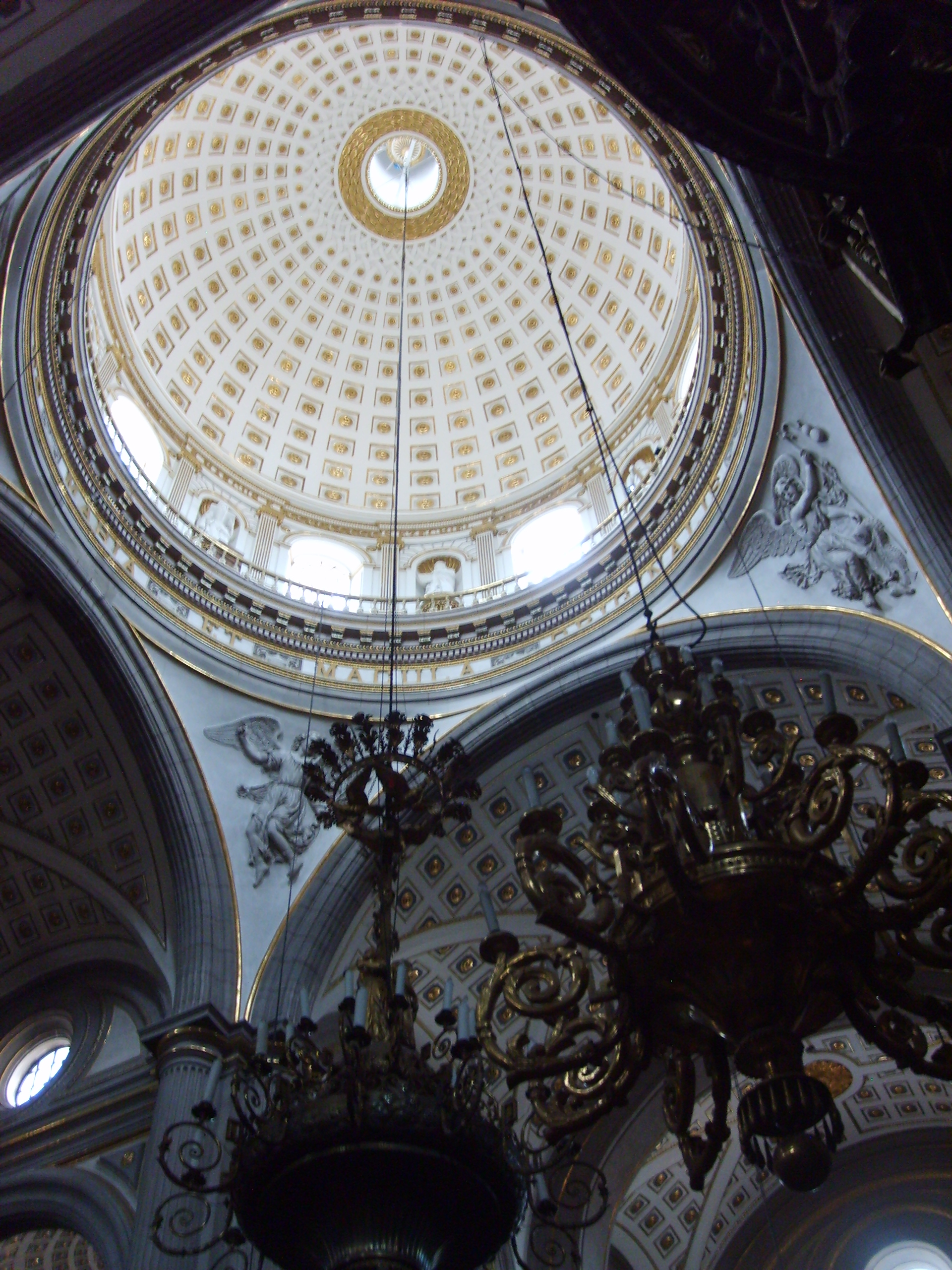 Cúpula central de la Catedral de Puebla, México.